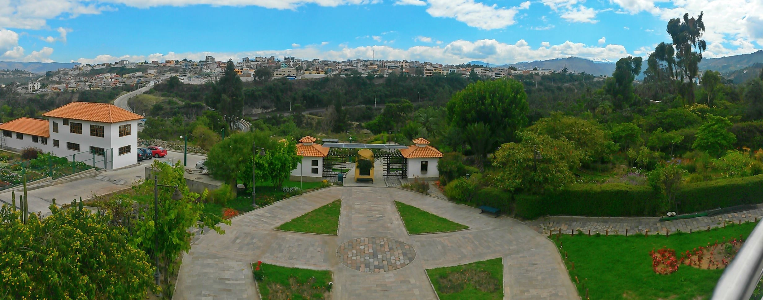 Vista panorámica